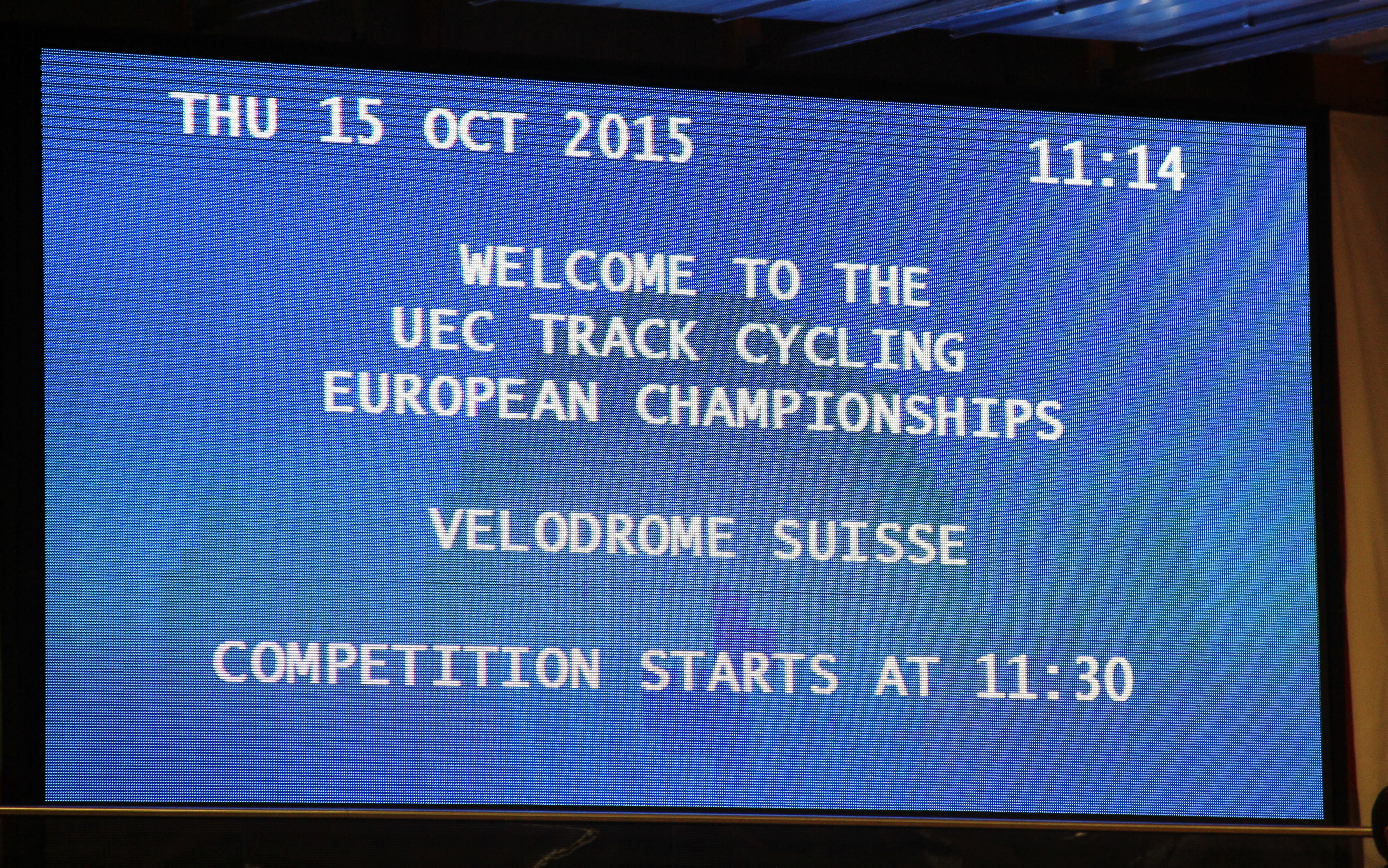 The making of this document was supported by the Community-Budget of Wikimedia Germany.